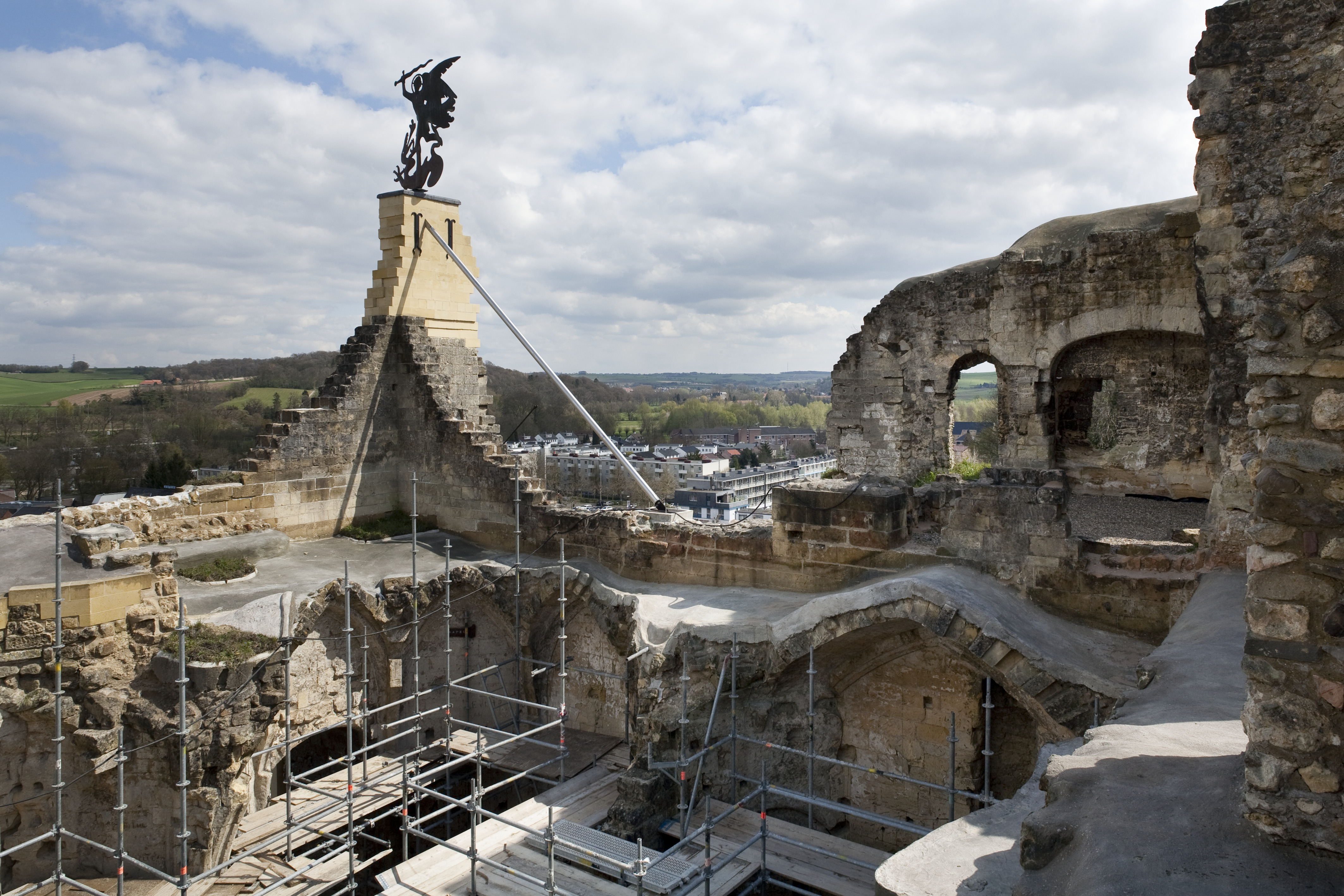 Kasteel Valkenburg: Overzicht van de kapel